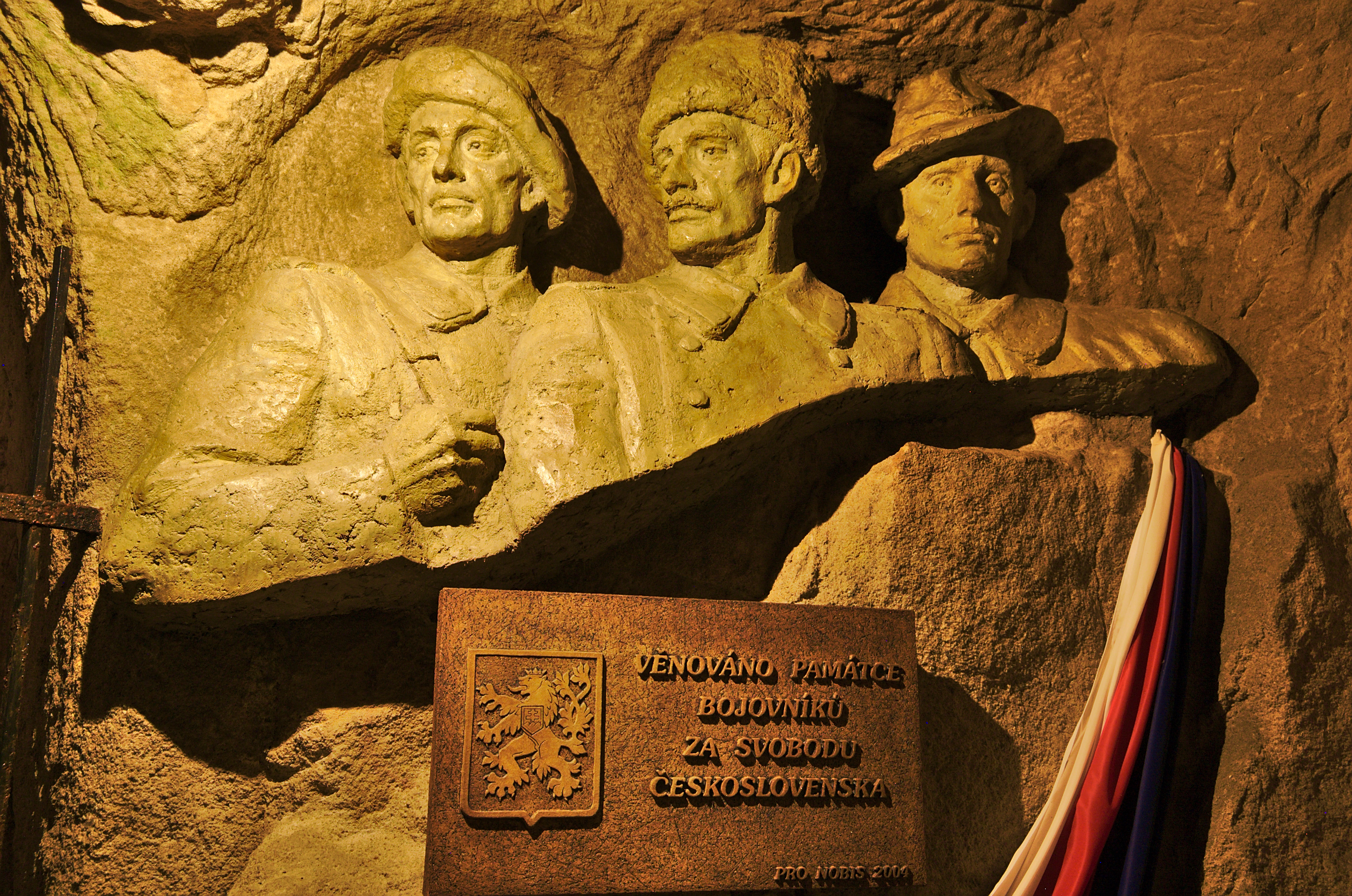 Jeskyně Blanických rytířů, Kunštát, okres Blansko